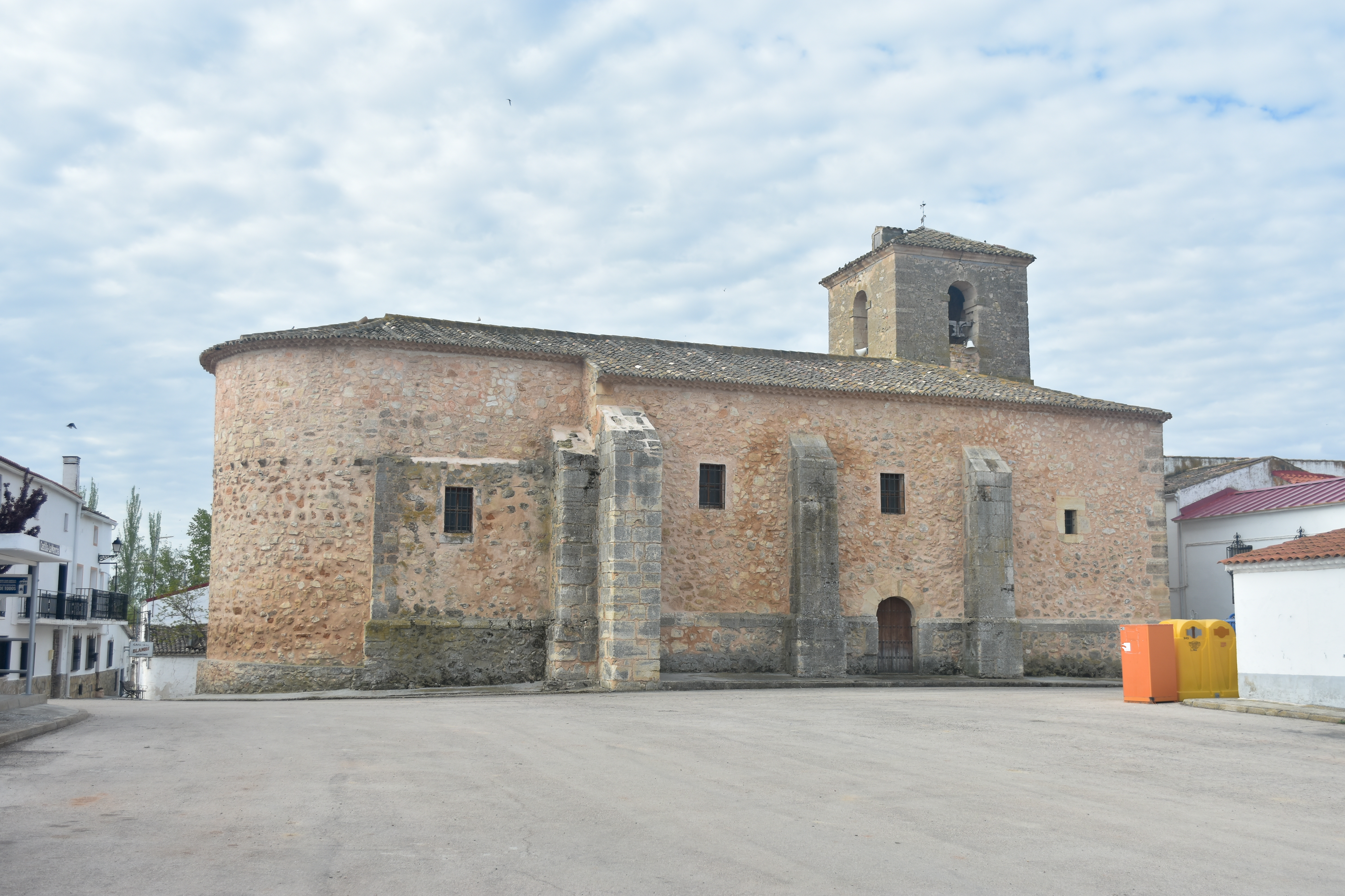 Iglesia de San Bernabé en Rozalén del Monte.